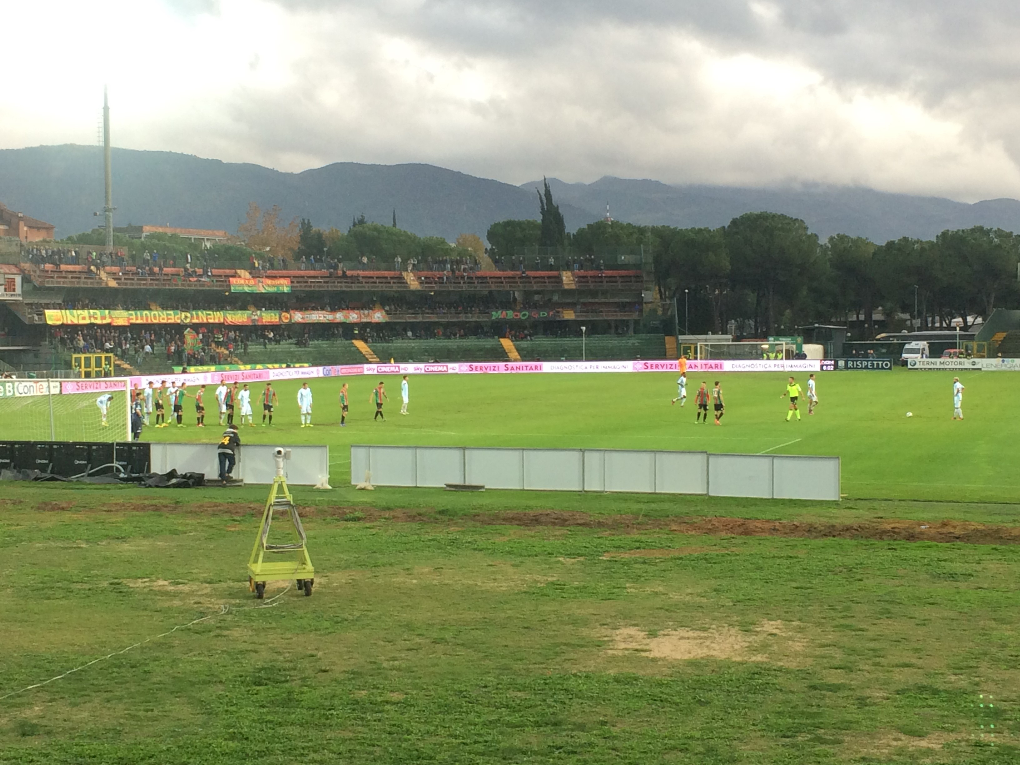 Settore ospiti dello stadio Libero Liberati di Terni.